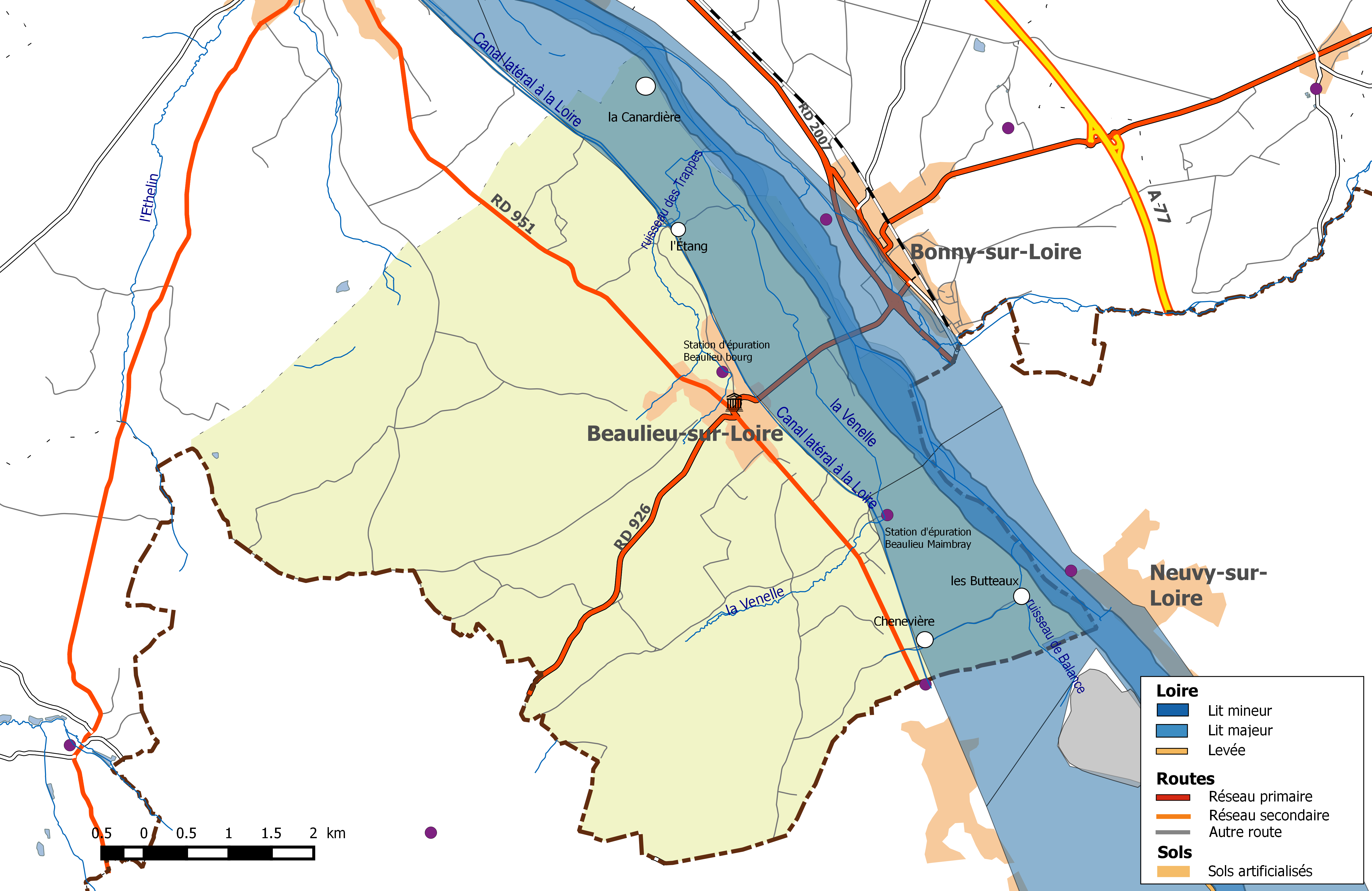 Zone inondable de la commune de Beaulieu-sur-Loire, dans le Loiret (France)